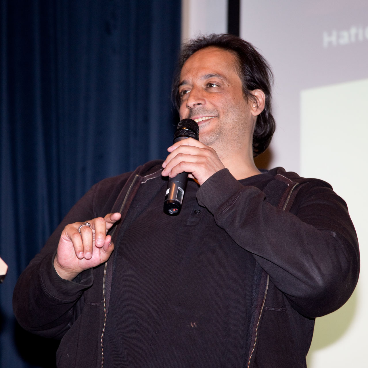 Hafid Bouazza bij de benoeming tot Vrijdenker van het jaar door de vrijdenkersvereniging 'De Vrije Gedachte'; Utrecht, 11 oktober 2014